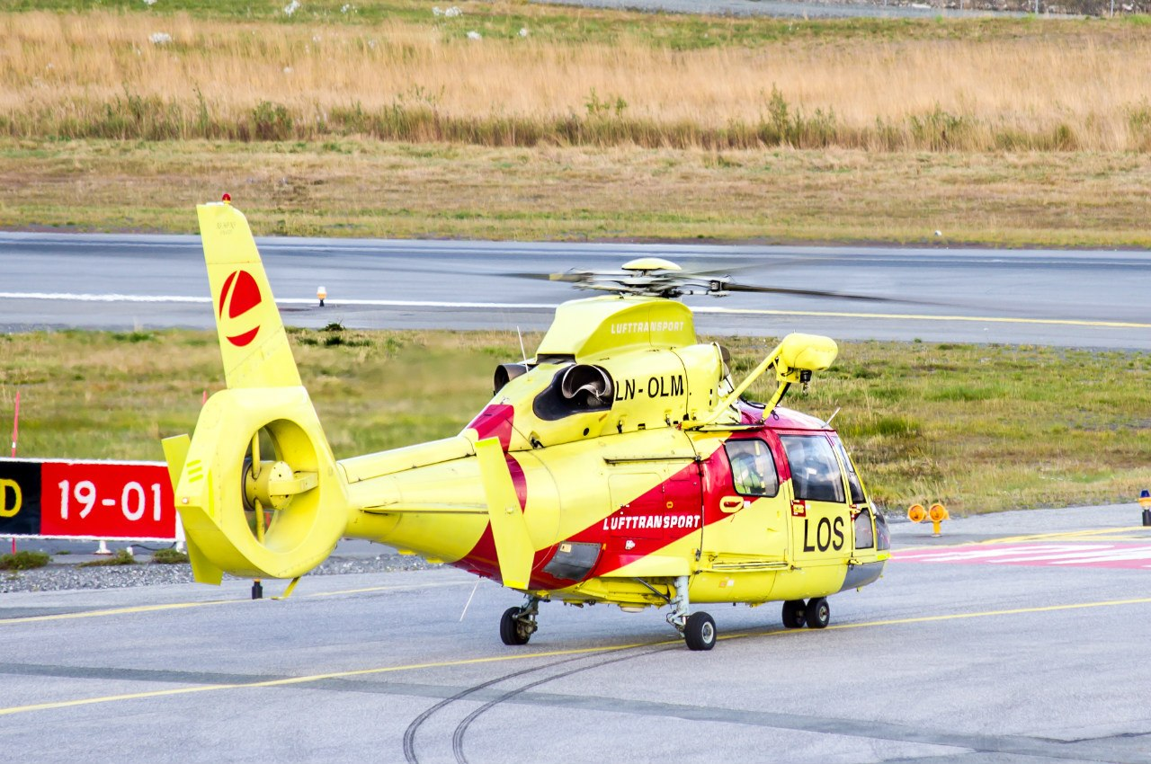 Eurocopter AS 365 N3